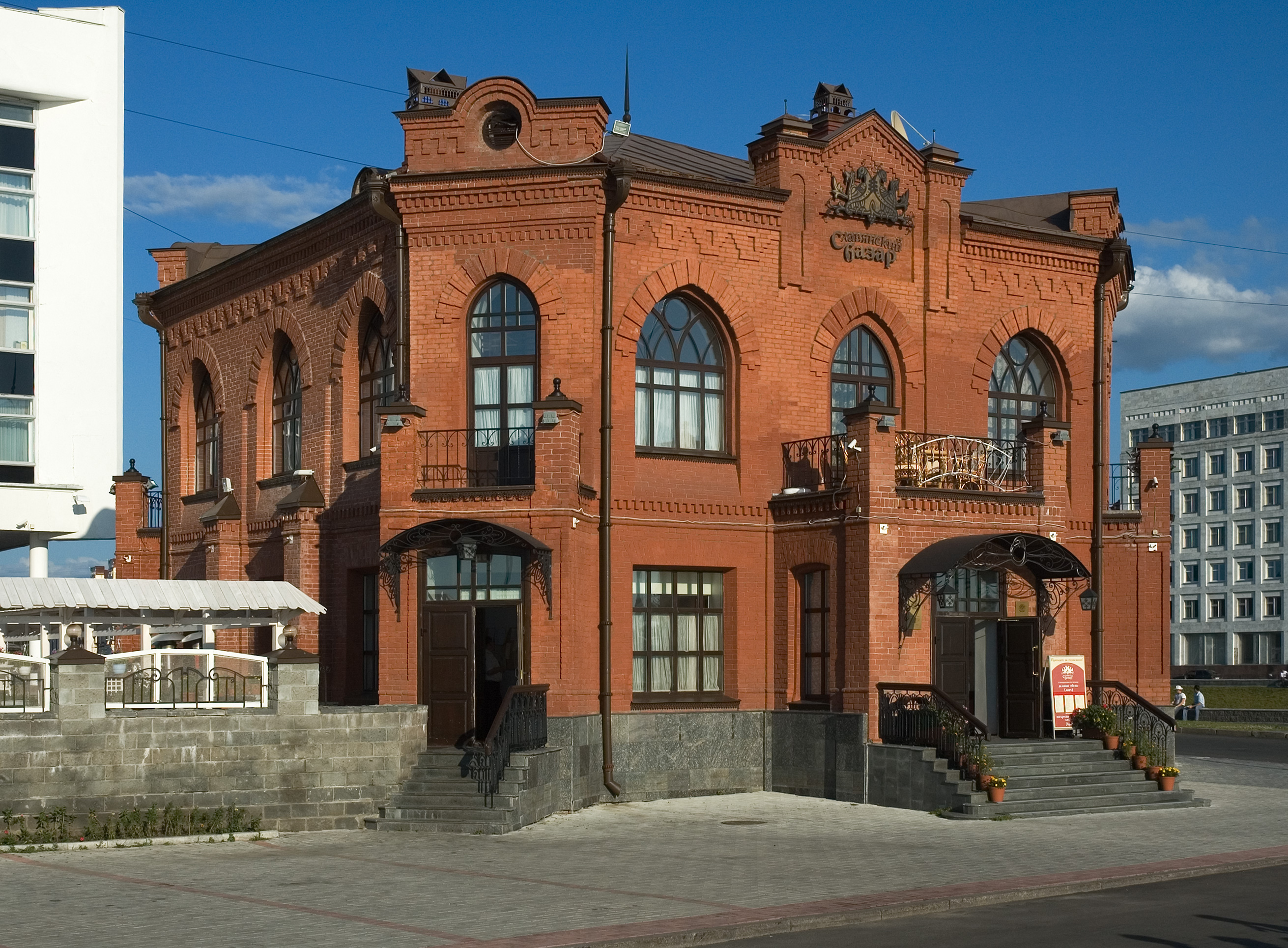 Ресторан «Славянский базар», пл. Ленина, 10.